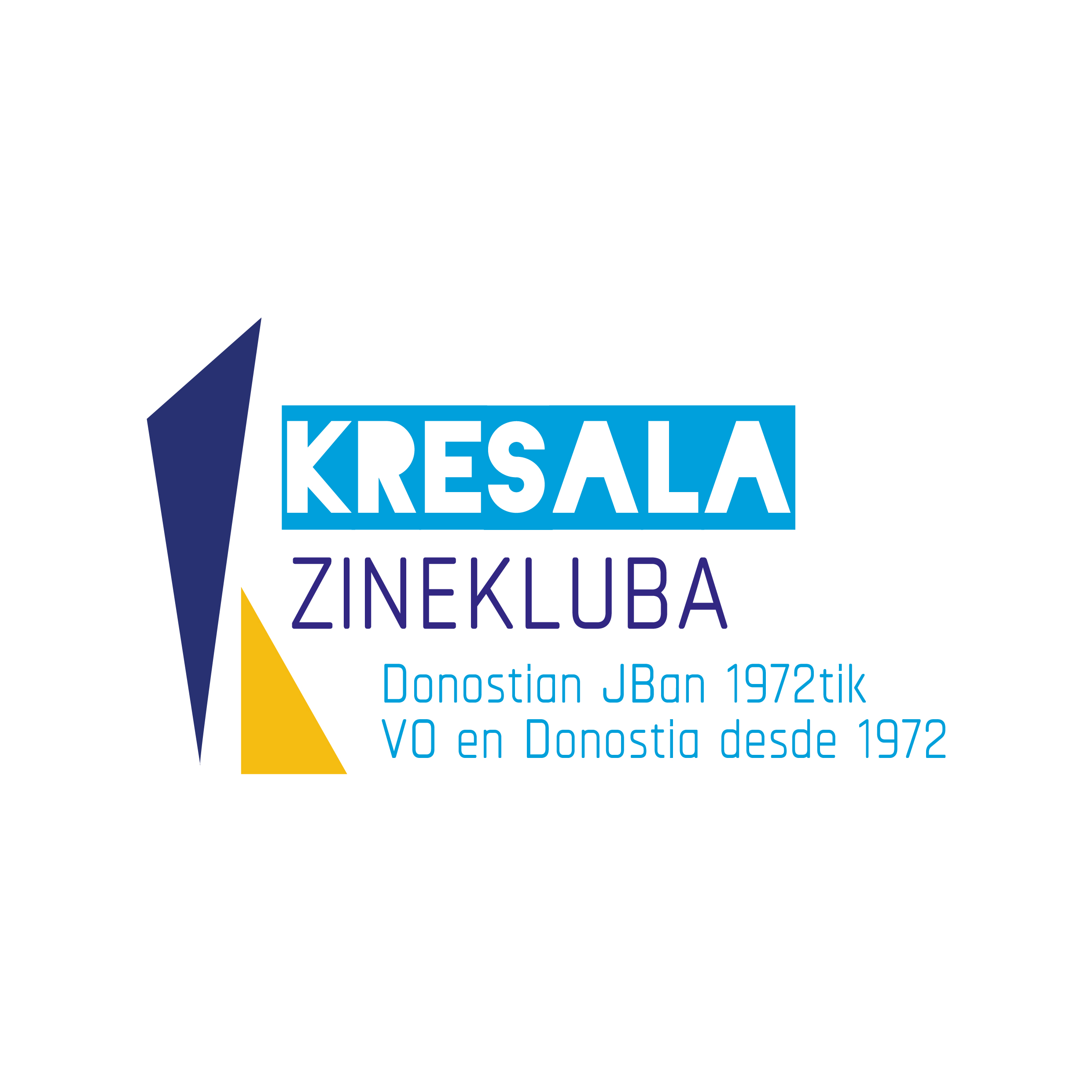 elkarteko logoa